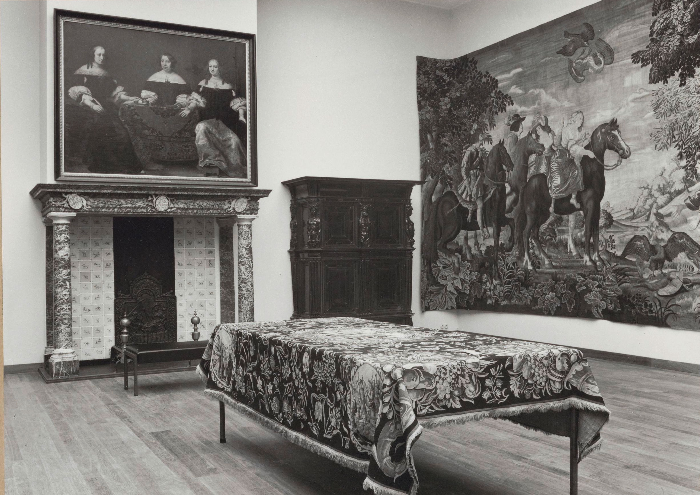 Zaal 258A gezien naar het zuidoosten in 1962. Boven de schouw het schilderij Drie regentessen van het Leprozenhuis te Amsterdam, door Ferdinand Bol. Ook de schoorsteenmantel is uit het Leprozenhuis afkomstig.